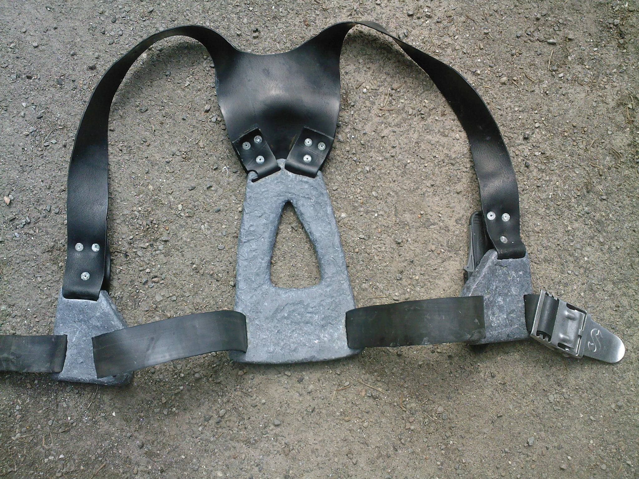 Baudrier artisanal de chasse sous marine réalisé à l'aide de plomb, d'une chambre à air et de rivets inox